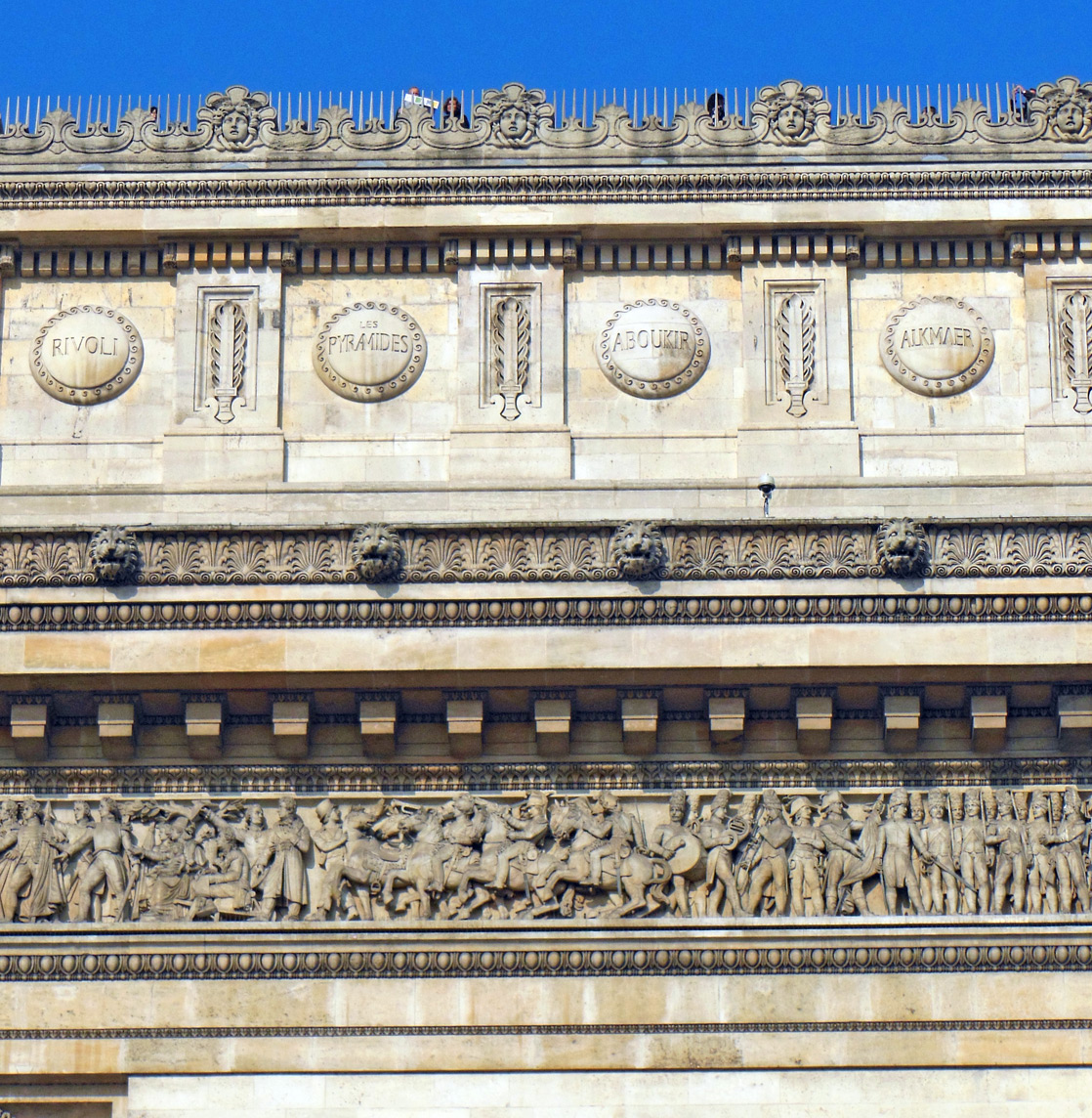 Parigi, arco di trionfo dell'Etoile, particolare dell'attico e della trabeazione principale